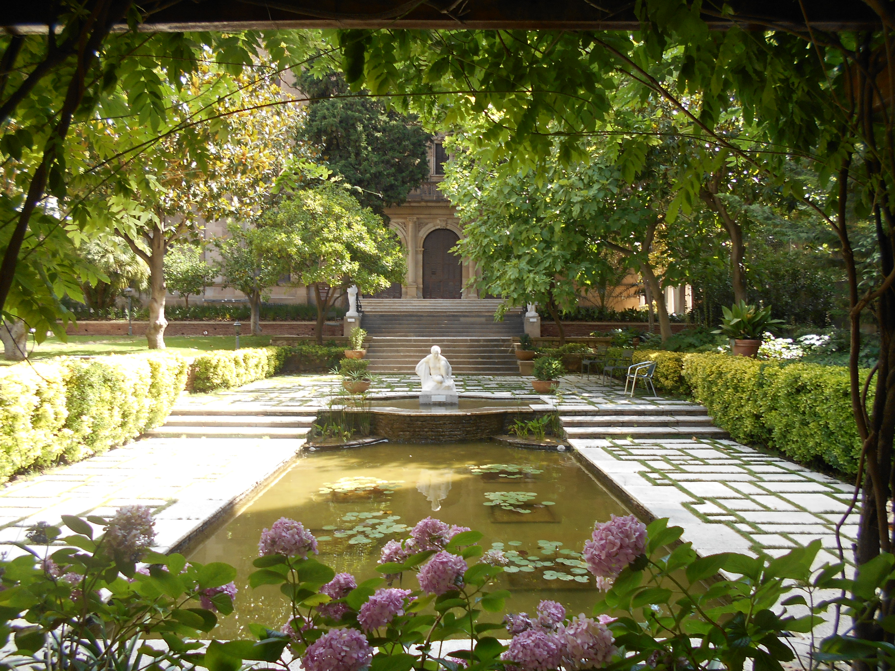 Jardín de la Fundación Julio Muñoz Ramonet.